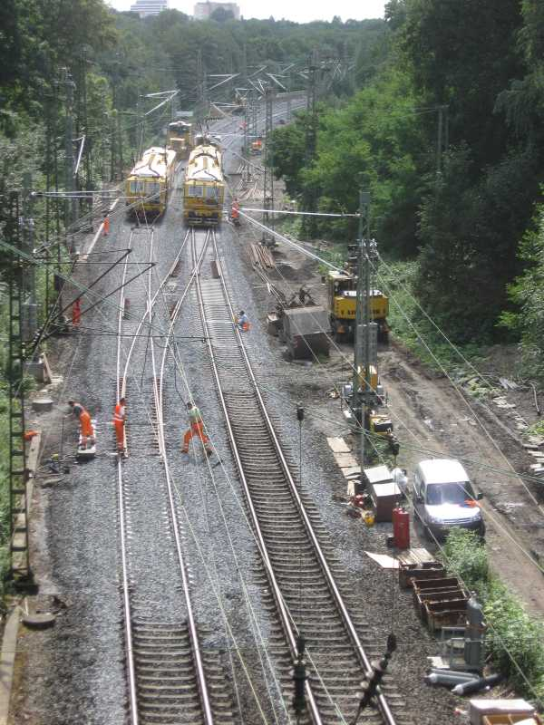 Bauarbeiten an der Bahnstrecke Essen–Wattenscheid–Bochum bei Essen-Kray Süd, von der Schönscheidtstraße aus gesehen.